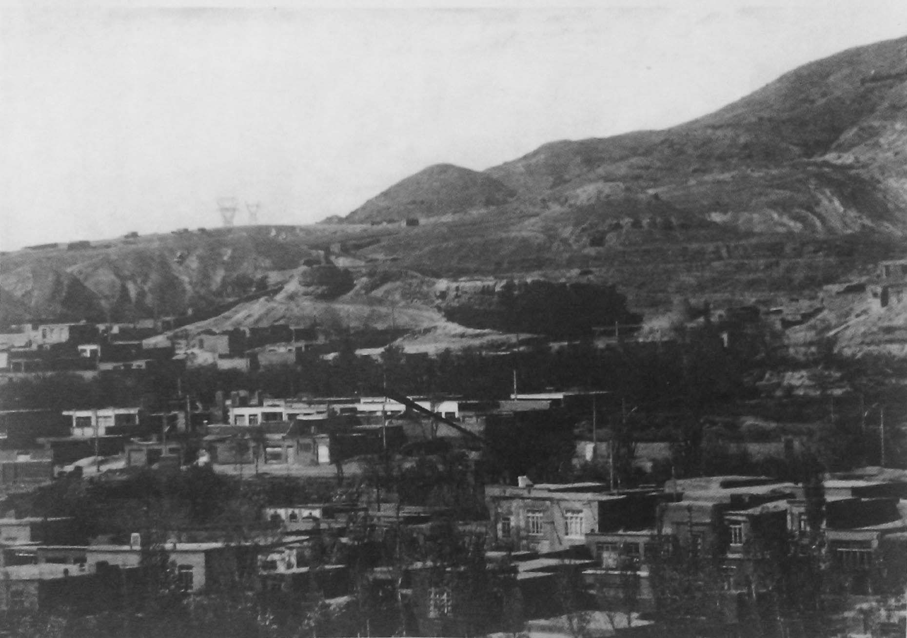 ربع رشیدی